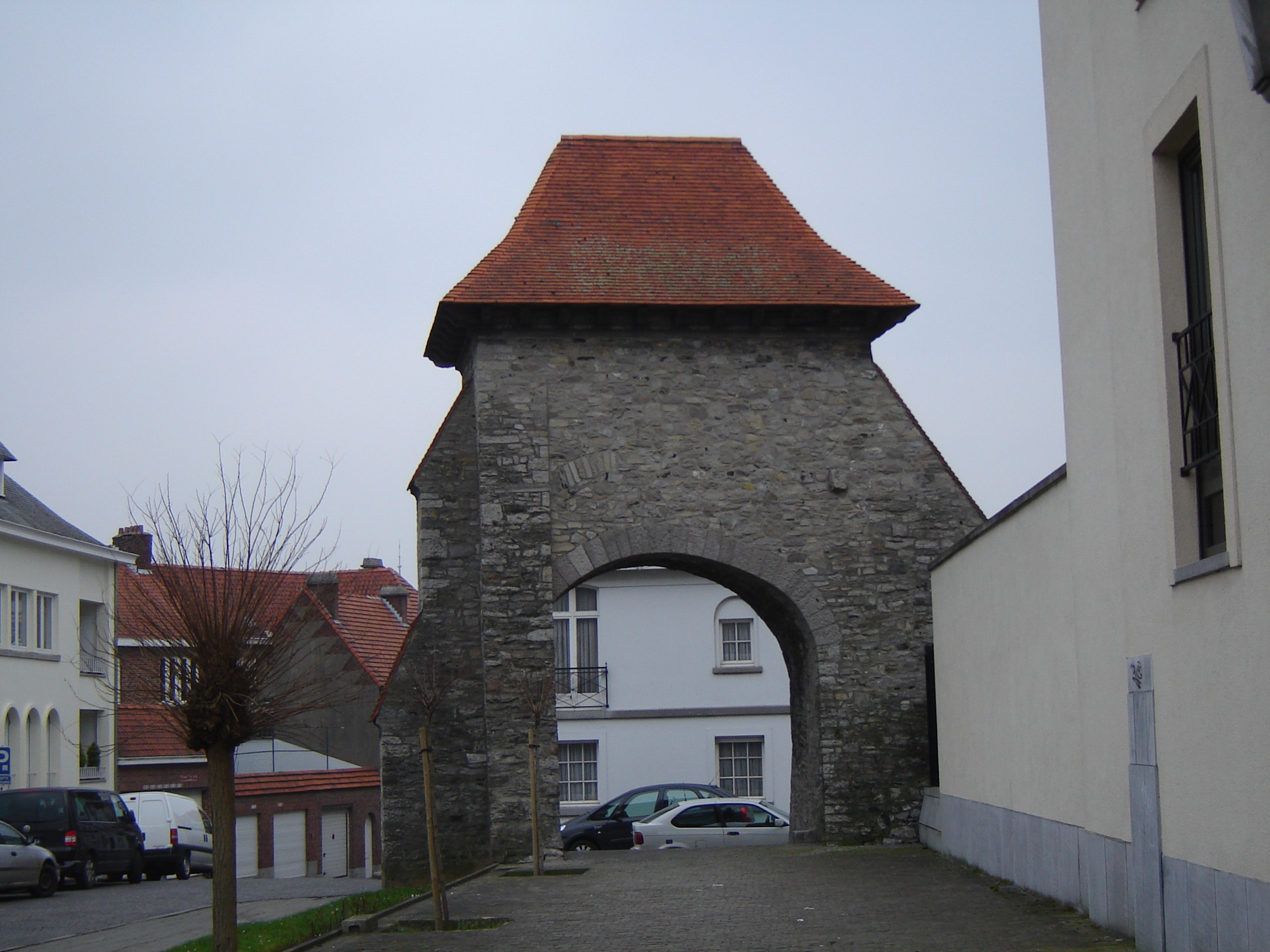 Tour de la Loucherie in Tournai, Hainaut, Belgium